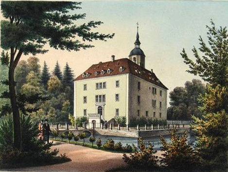 Schloss Seerhausen um 1860